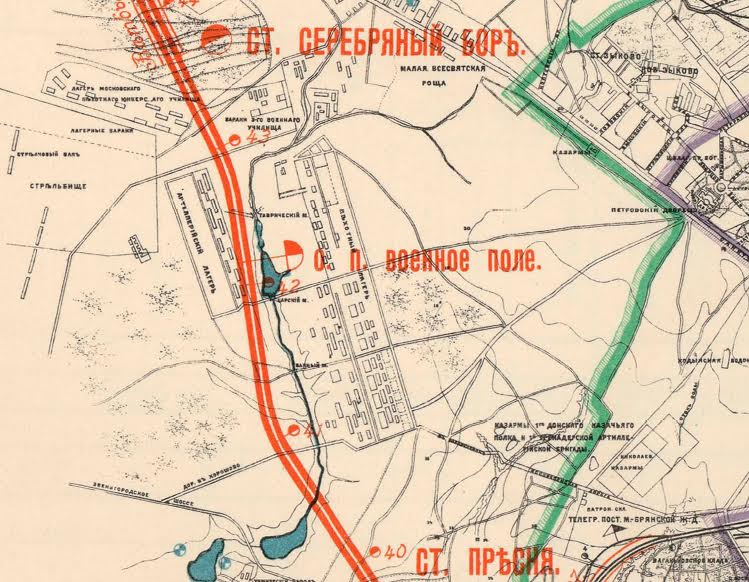 Полустанок Военное поле на плане Московской Окружной железной дороги.